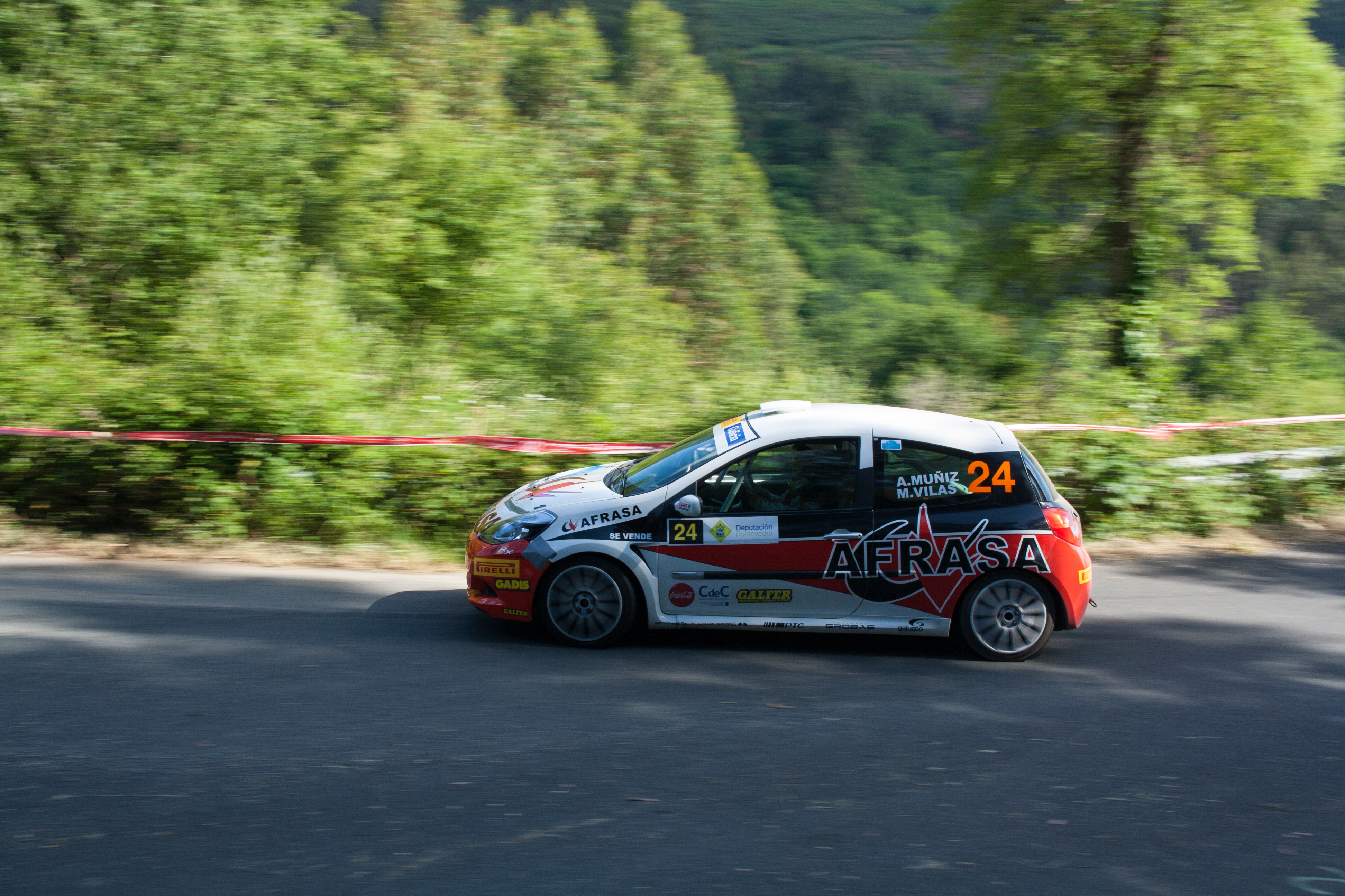 ALVARO MUÑIZ MIGUEL VILAS